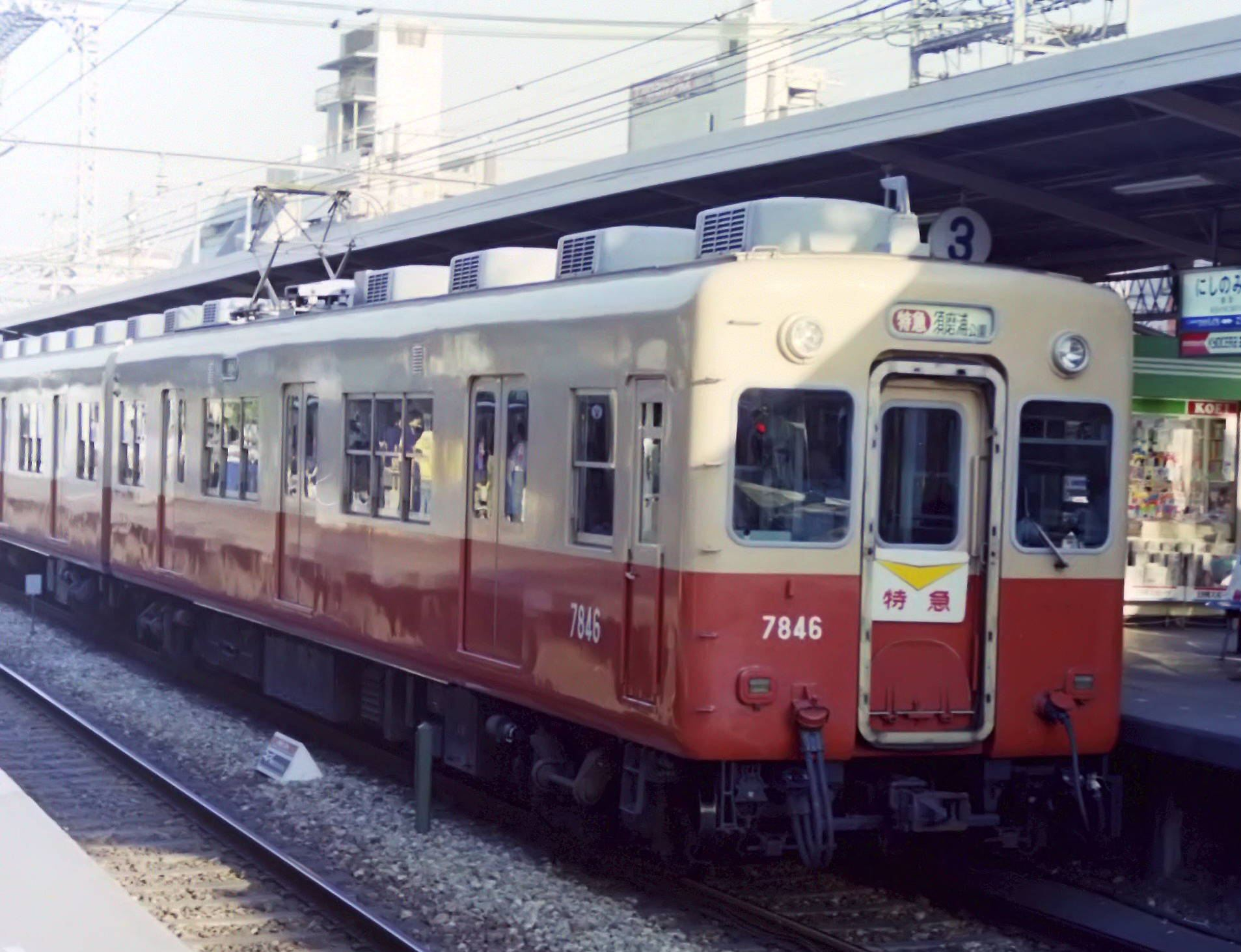 阪神電気鉄道7846 1987年 西宮駅